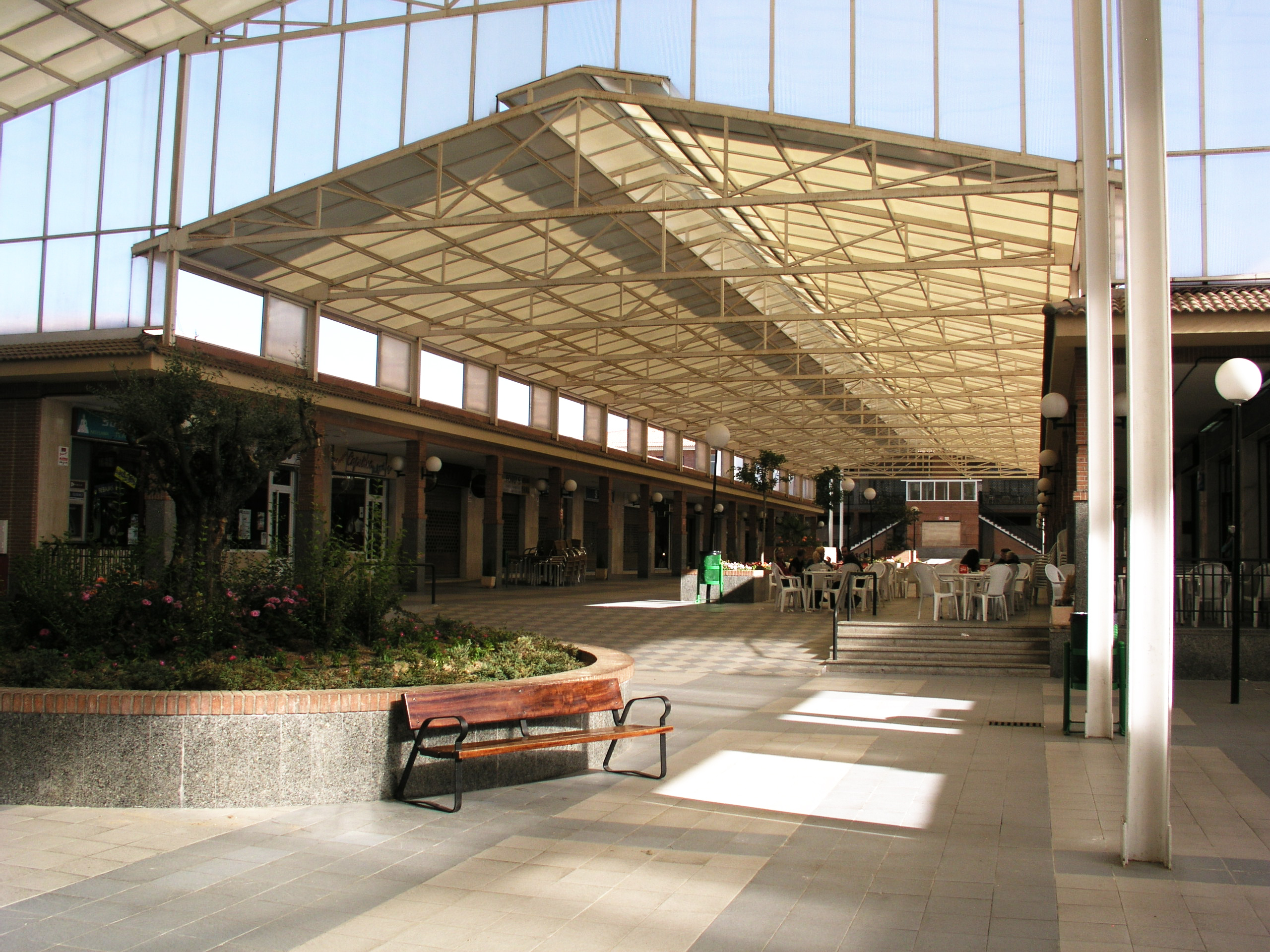 Centro Comercial, Eurovillas, Nuevo Baztán, Spain.